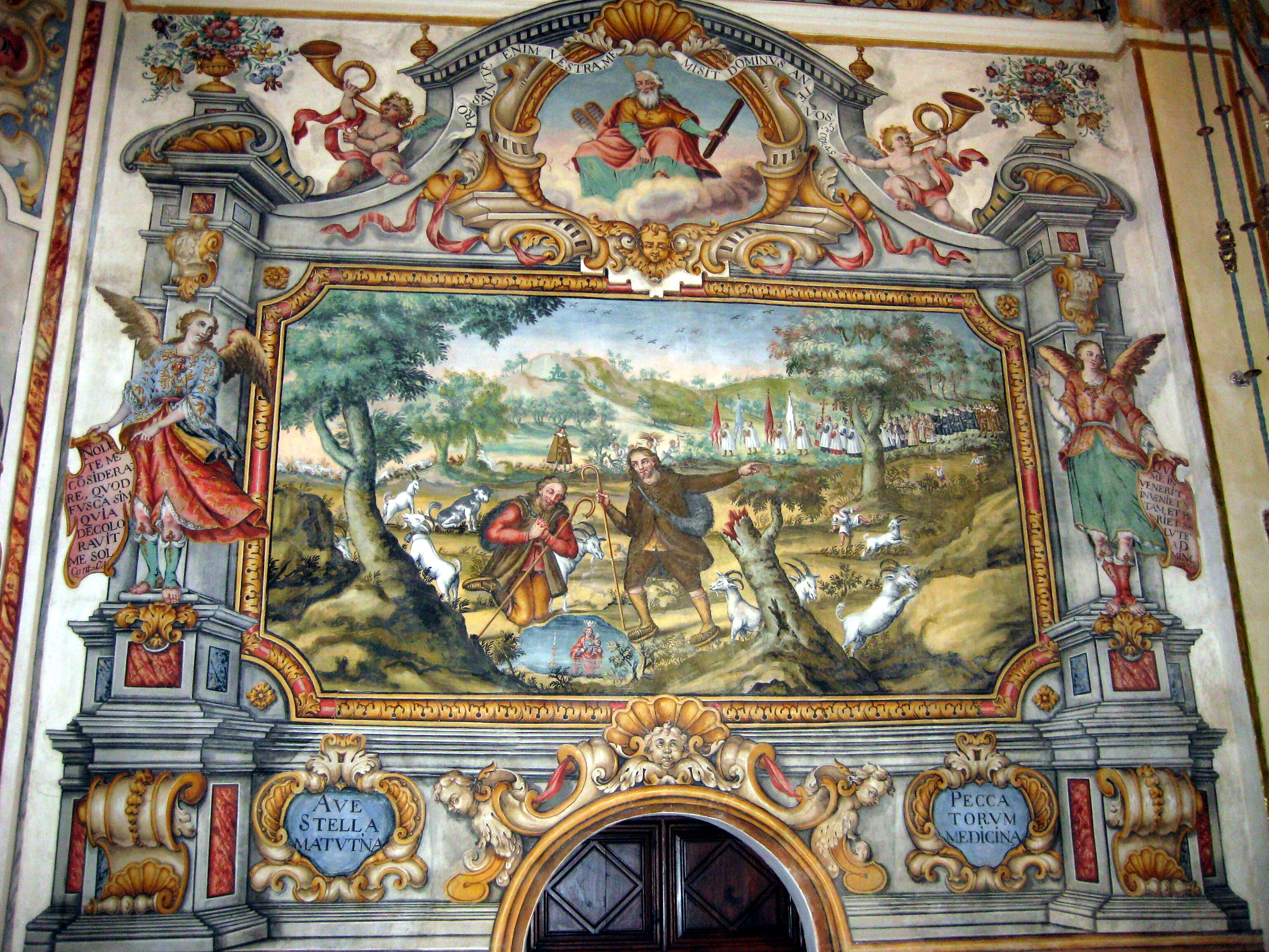 Pintura mural del lateral del presbiteri on s'explica la troballa de la imatge, del santuari de la Mare de Déu de la Font de la Salut de Traiguera (Baix Maestrat)